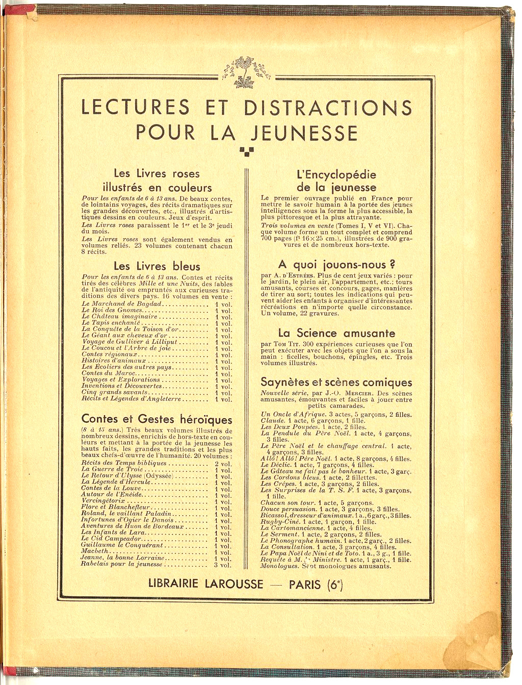 Histoires parisiennes, par Franc Nohain, illustrations Marie-Madeleine Franc-Nohain : catalogue des éditions Larousse, Lectures et distractions pour la jeunesse.